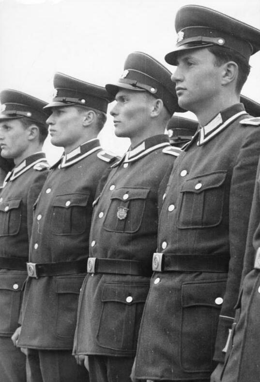 Vereidigung erster Einheiten der NVA ADN-ZB/Heilig Erstes Regiment der Nationalen Volksarmee. Soldaten und Offiziere des ersten Regiments der ersten Division der Nationalen Volksarmee leisteten am 30.4.1956 den Schwur auf die Heimat. Das Regiment, der erste Verband der Nationalen Volksarmee überhaupt, erhielt aus der Hand des Ministers für Nationale Verteidigung, Generaloberst Willi Stoph, die Regimentsfahne. UBz: Angehörige der Nationalen Volksarmee während des feierlichen Aktes. 37818-0010